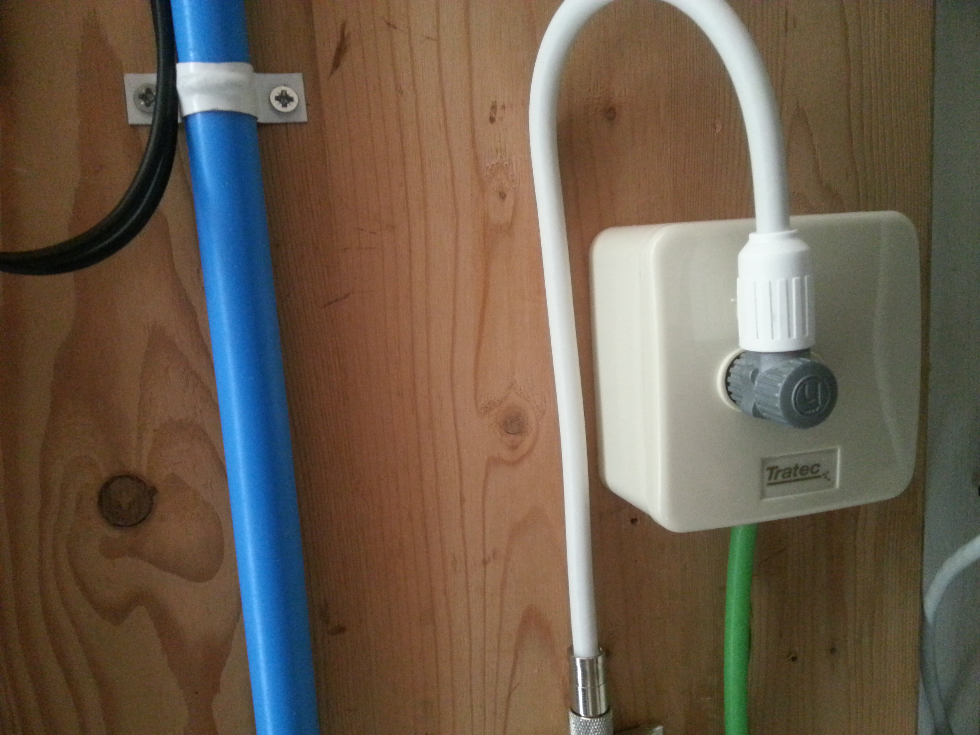 Abonnee Overname Punt.